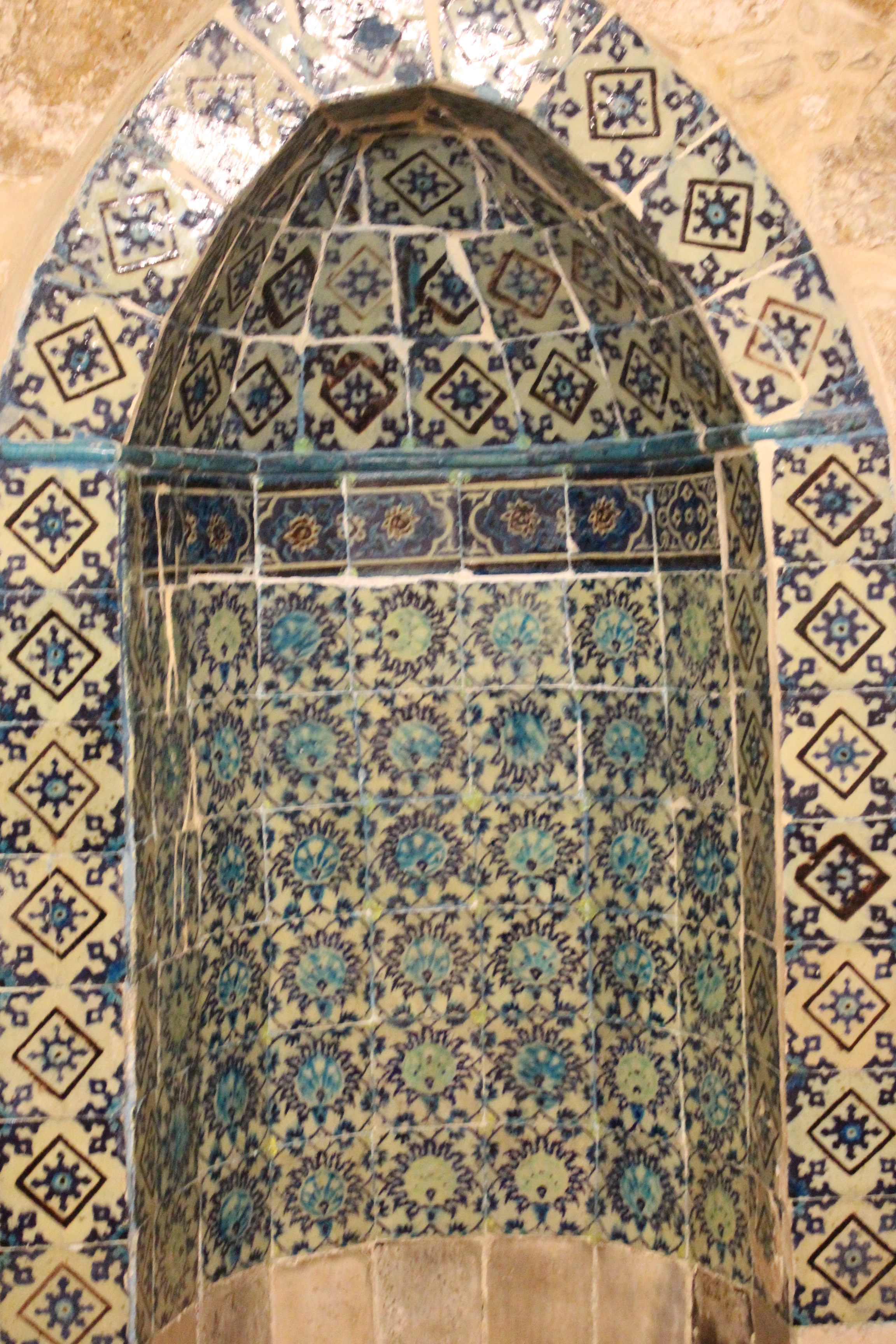 مكان وقوقف الإمام أثنا الصلاة وبعتبر من التحف الفنية في المسجد الإبراهيمي